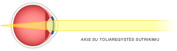 Akis su toliaregystės sutrikimu